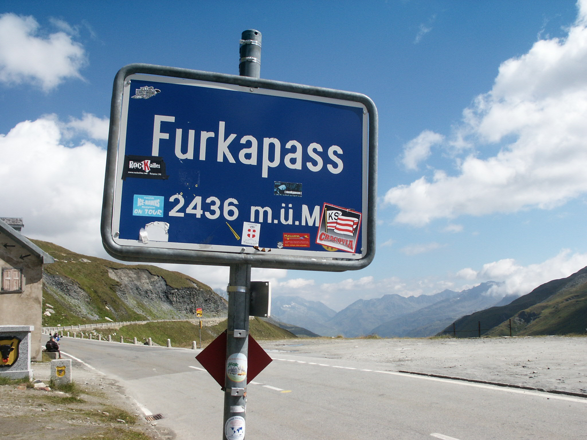 Switzerland, Furkapass, Furka high alpine pass